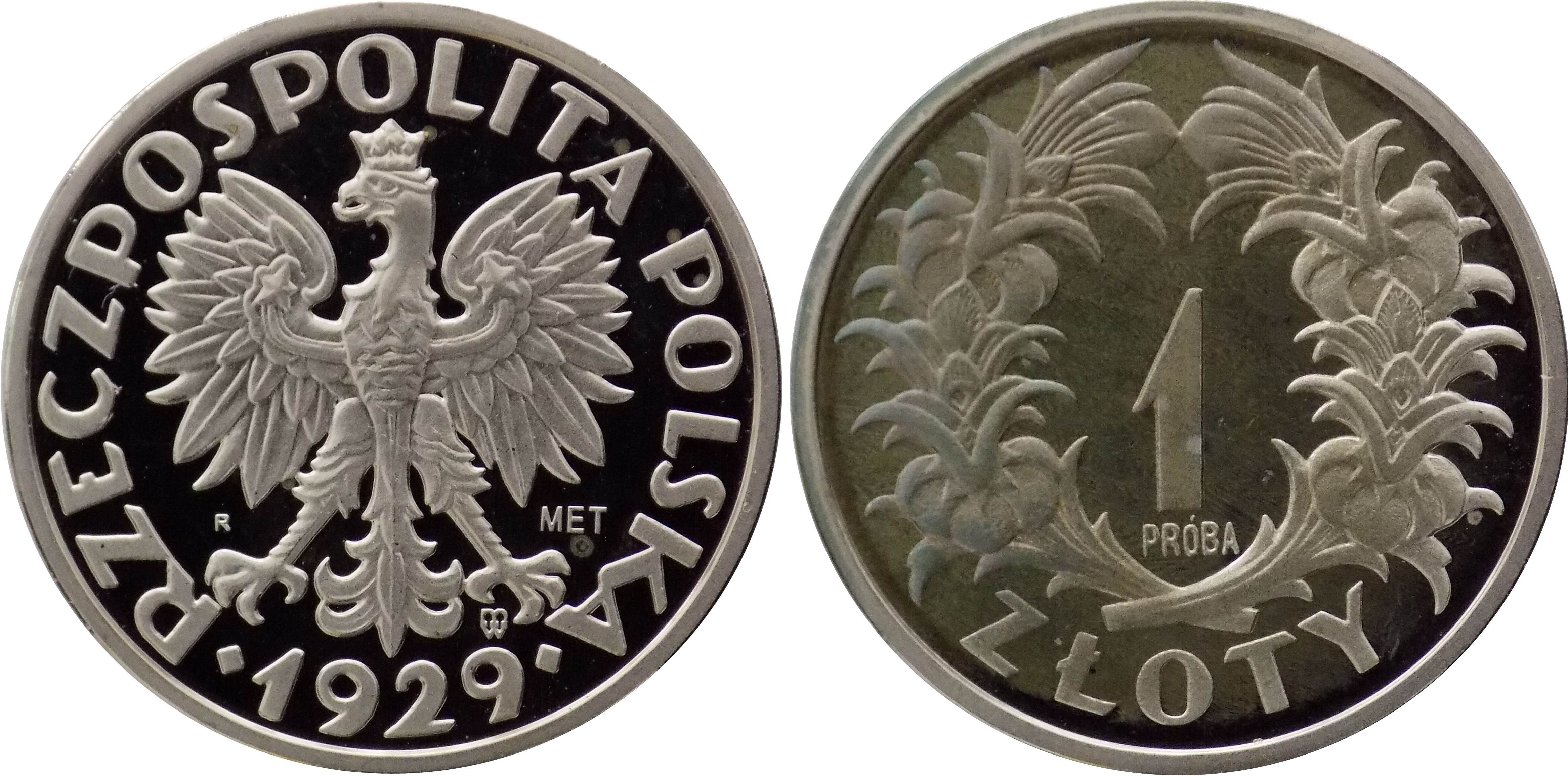 Replika 1 złoty 1929 wieniec z kwiatów